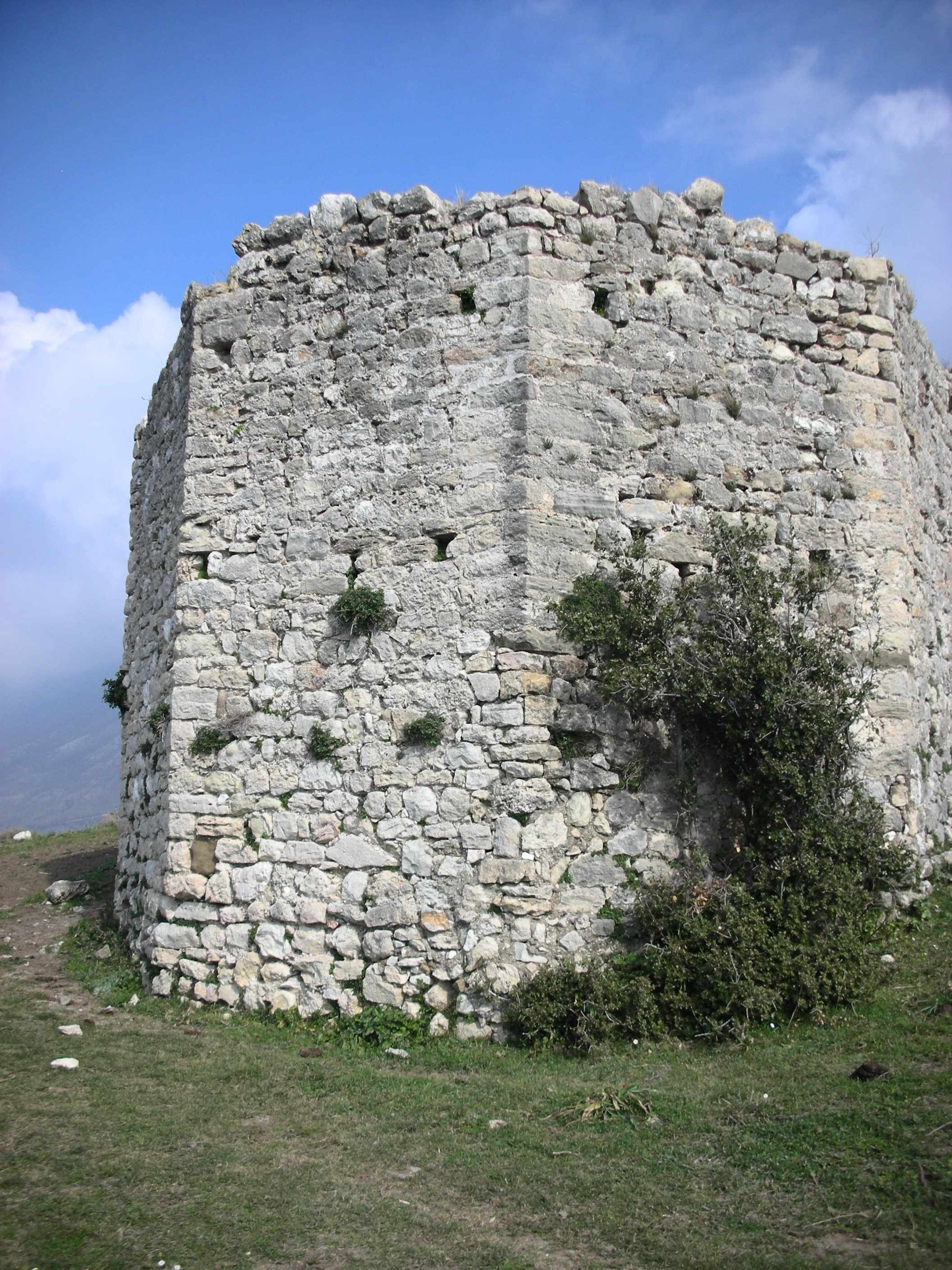 Fortress Of Gjon Boçari